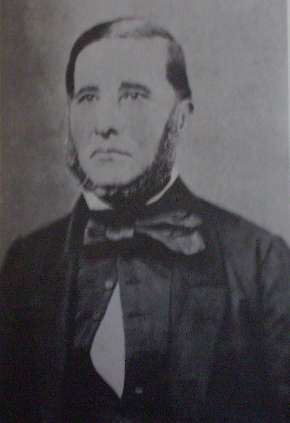 Irineo Portela